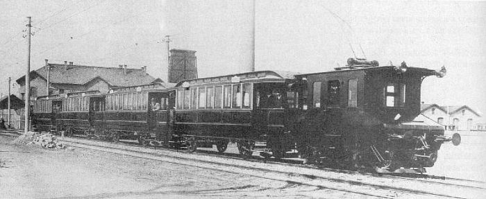 A Budapest-Szentlőrinci Helyiérdekű Villamos Vasút (BLVV) mozdonyos munkásvonata az 1900-as években